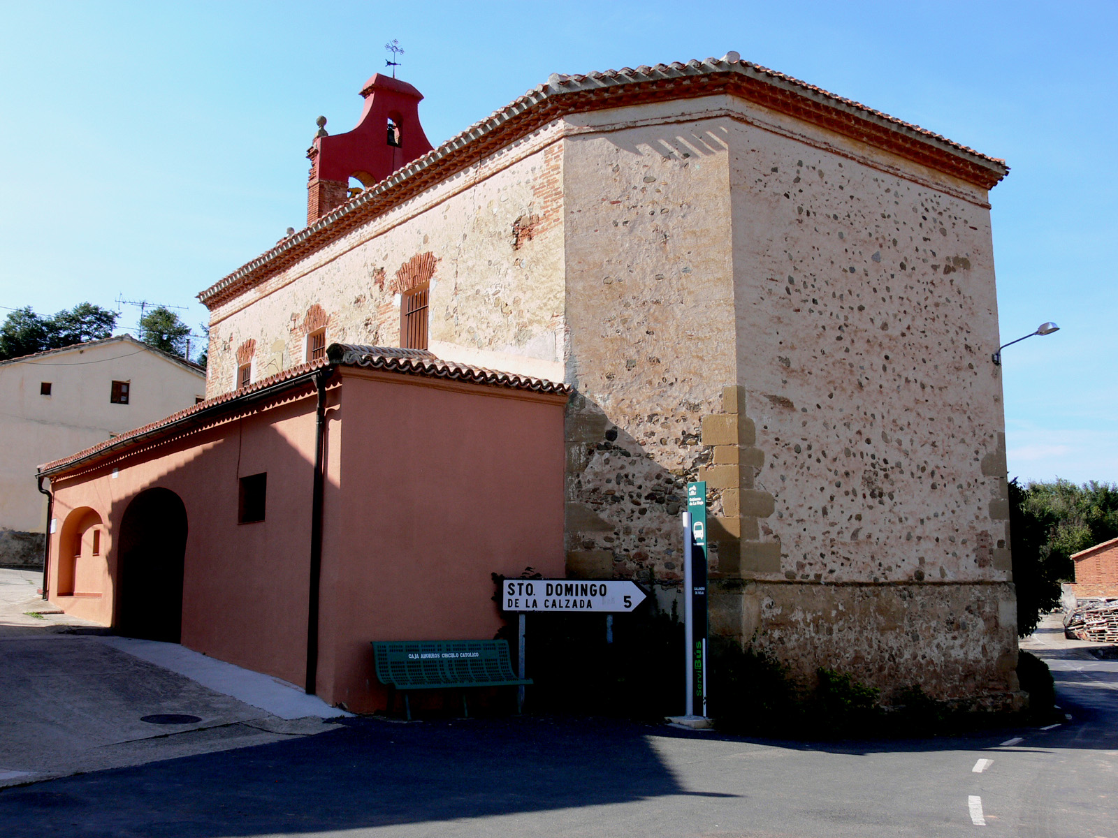 Iglesia de San Juan Evangelista en Gallinero de Rioja (España)